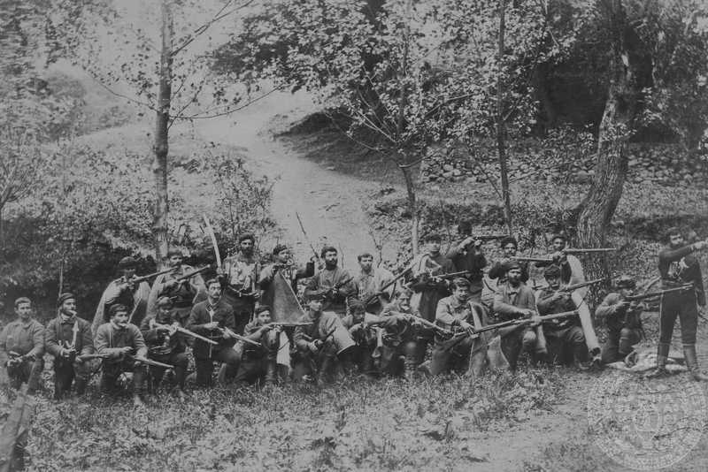 Четата на Йоанис Каравитис